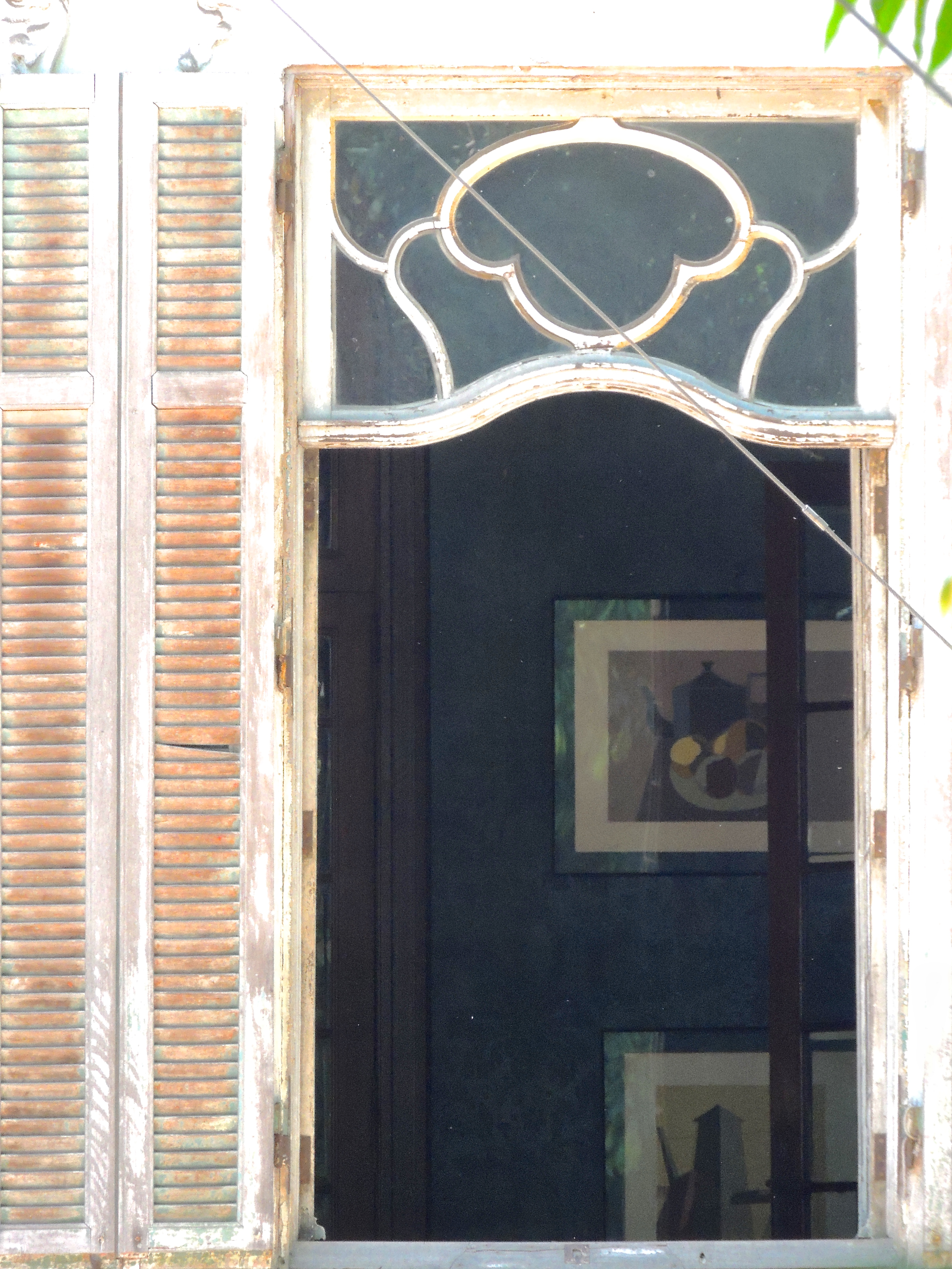 Detalhe de janela e obras de arte dentro da residência Joaquim Franco de Melo, na avenida Paulista, São Paulo (SP), Brasil.